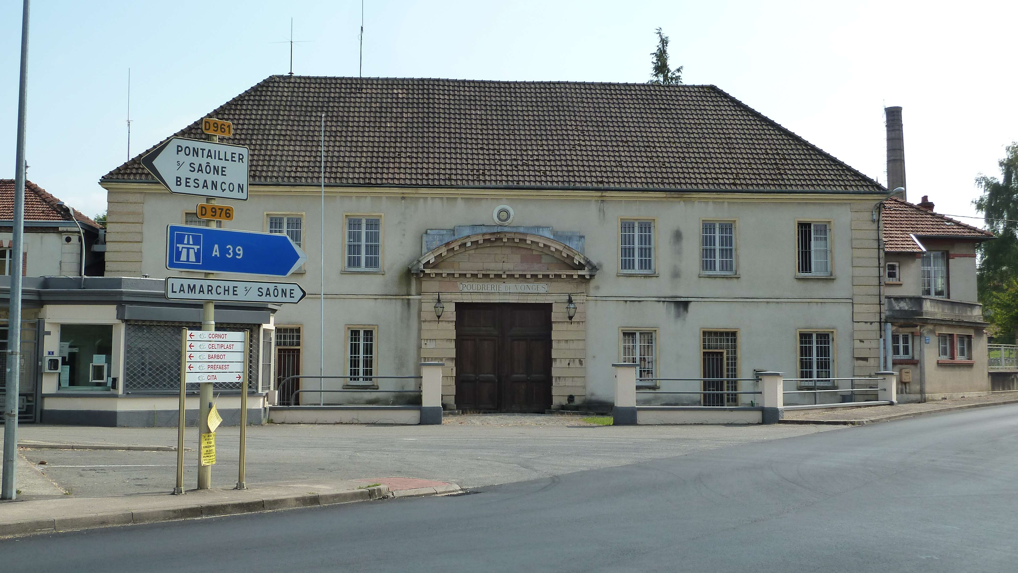 Entrée principale de la poudrerie nationale de Vonges route de Pontailler.